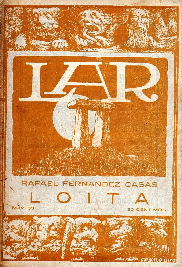 33 Loita. Rafael Fernández Casas. Lar. 1927.jpg